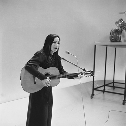 Julie Felix in het televisieprogramma Fanclub